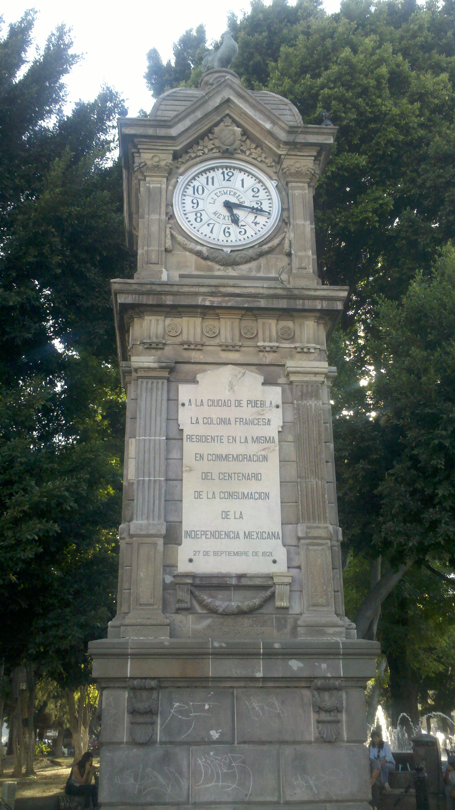 Reloj El Gallito, Puebla, México. 11 sur esquina con Avenida Reforma. Paseo Bravo.